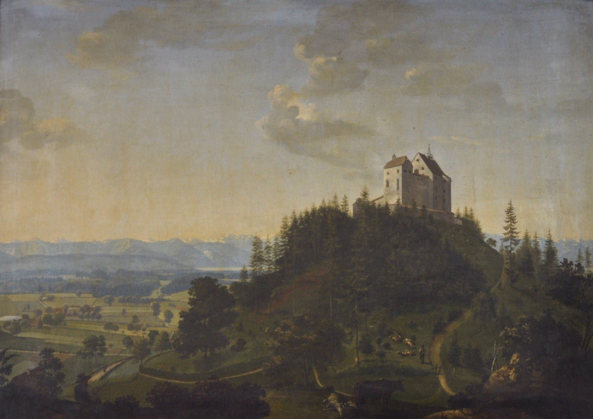 Burg Waldburg (Württemberg), Gemälde "Die Waldburg von Nordosten"